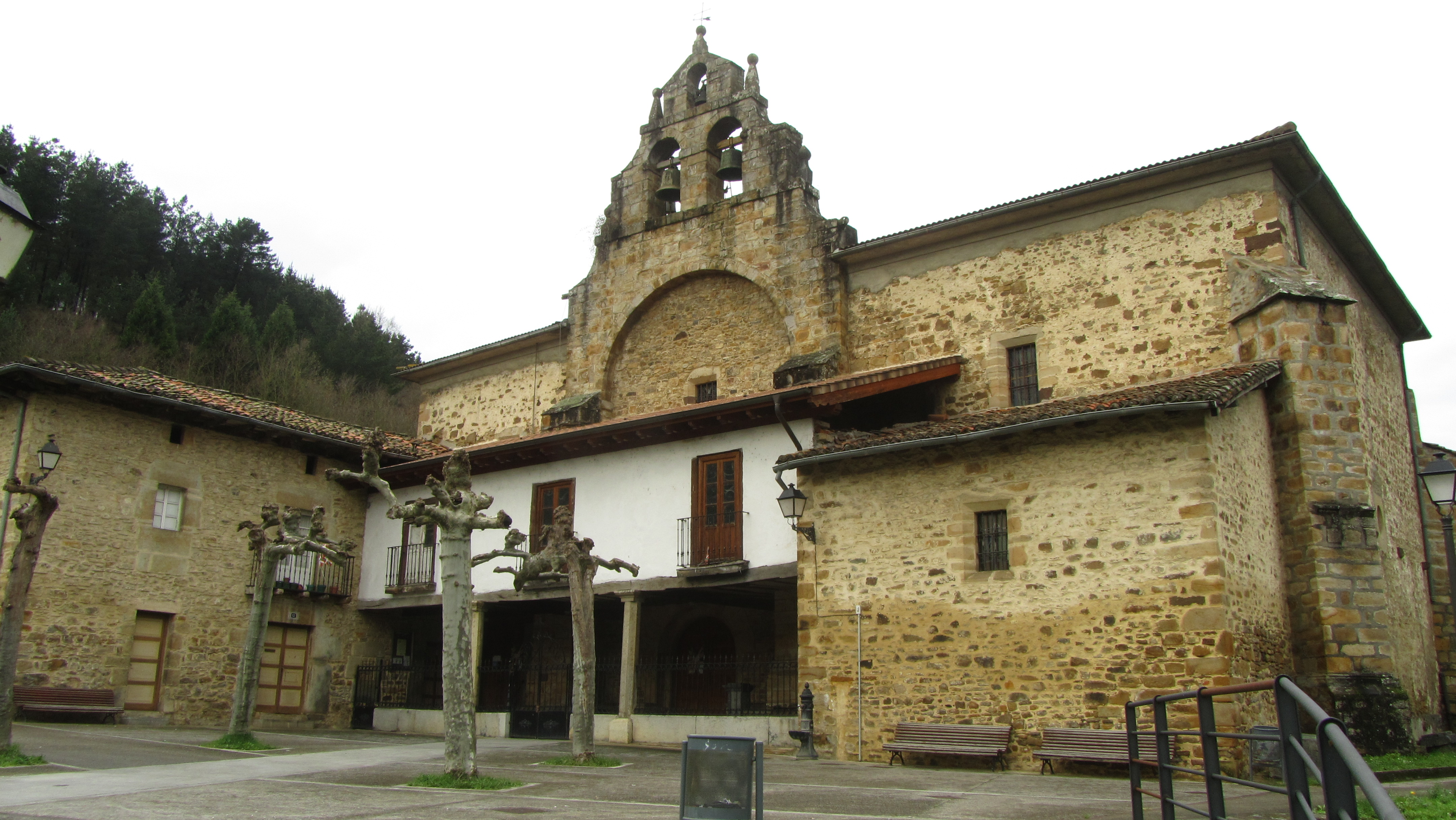 Luiaondo-Iglesia parroquial